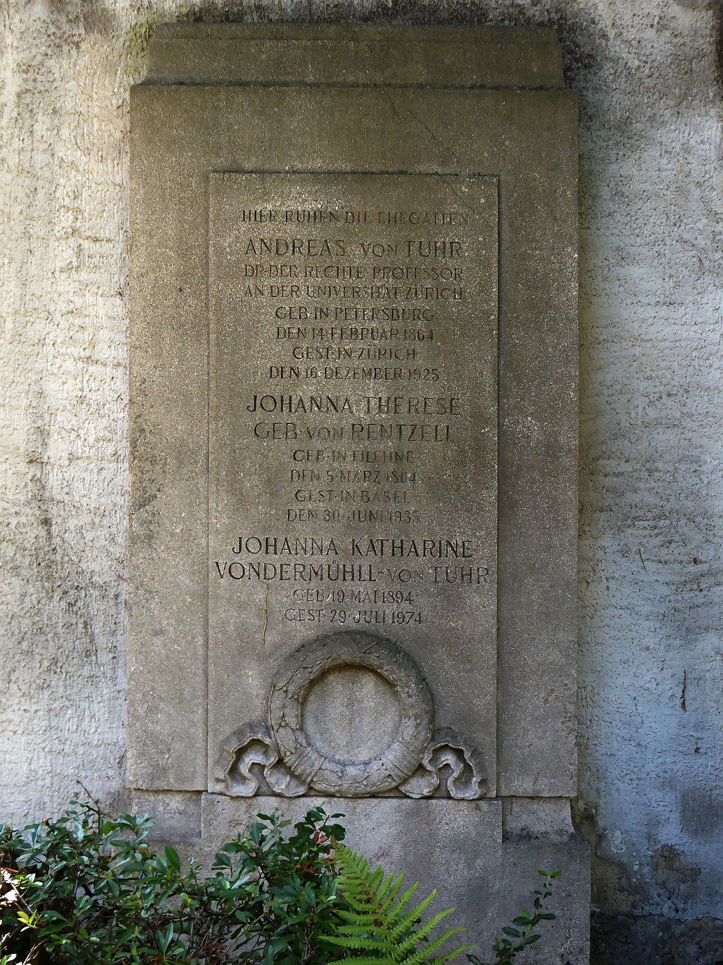 Andreas von Thur (1864–1925) Jurist, Rektor, Grab auf dem Friedhof Wolfgottesacker, Basel